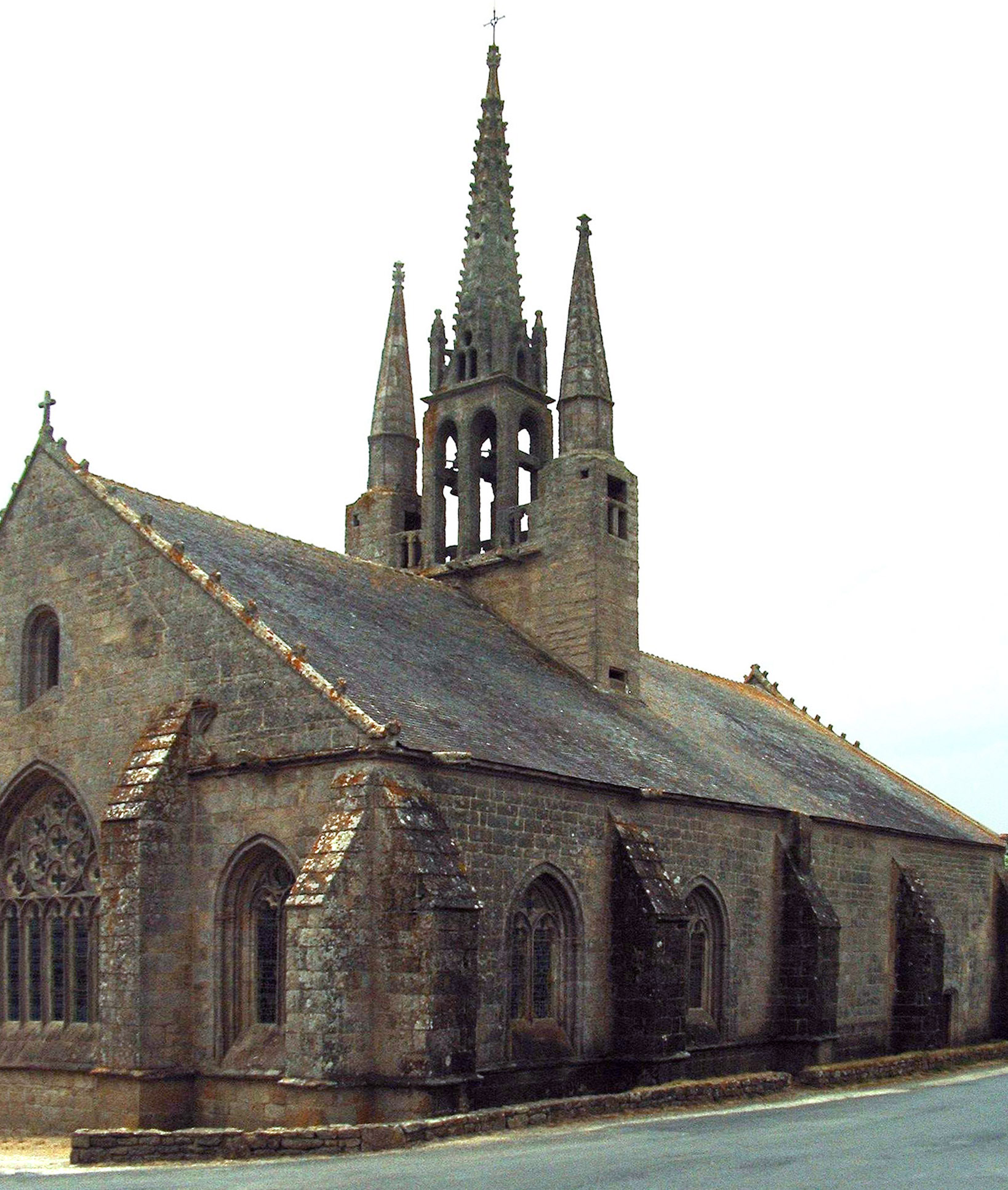 Kirche in Tronoën / Saint-Jean-Trolimon (France)